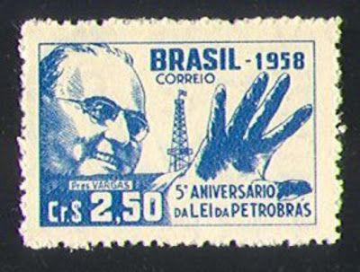 Selo postal do Correio do Brasil sobre os 5 anos da Lei Federal do Brasil 2004 de 1953.